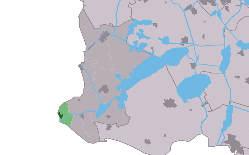 Kaartsje fan himrik fan Starum